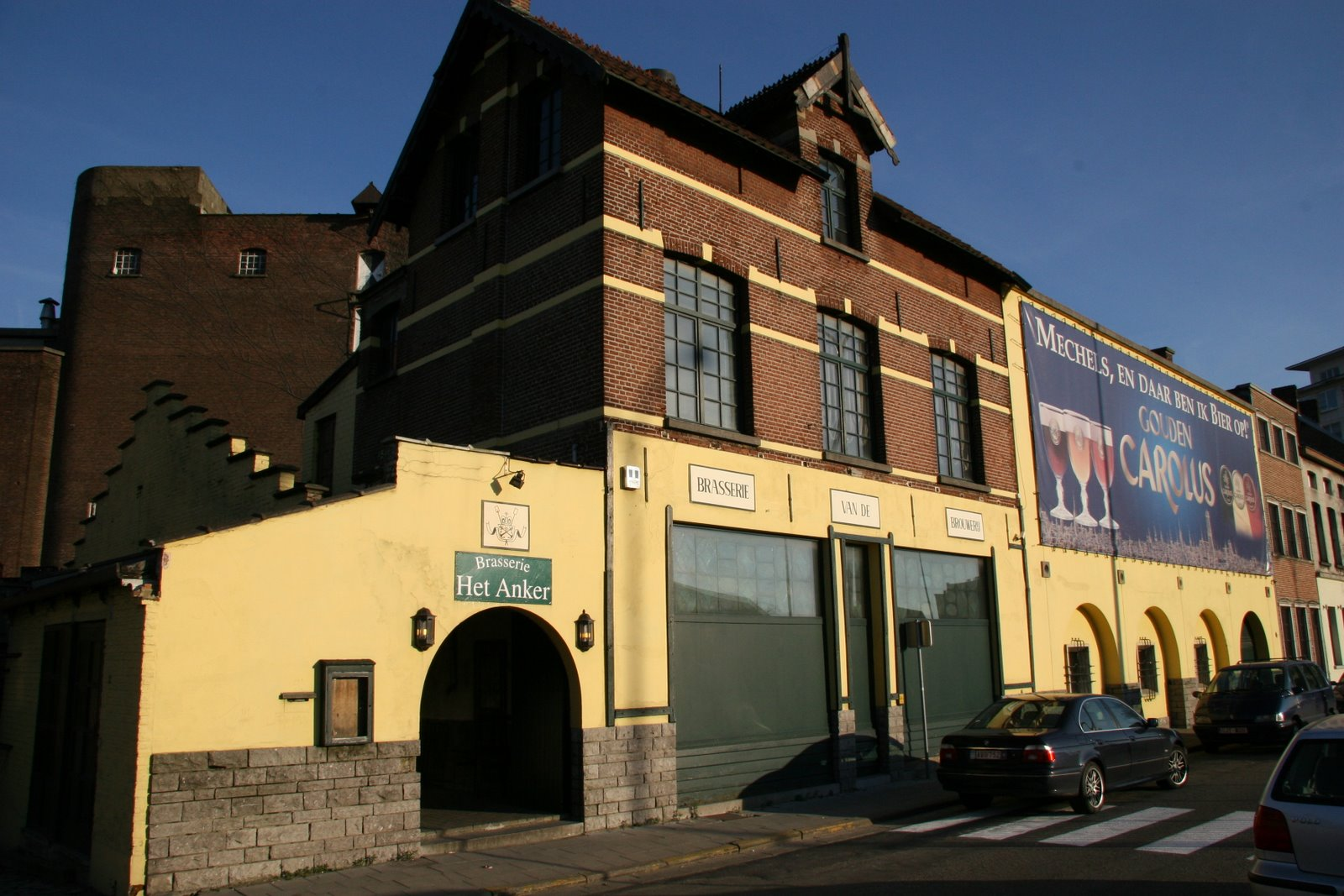 The Anker brewery (Brasserie Het Anker) in Mechelen